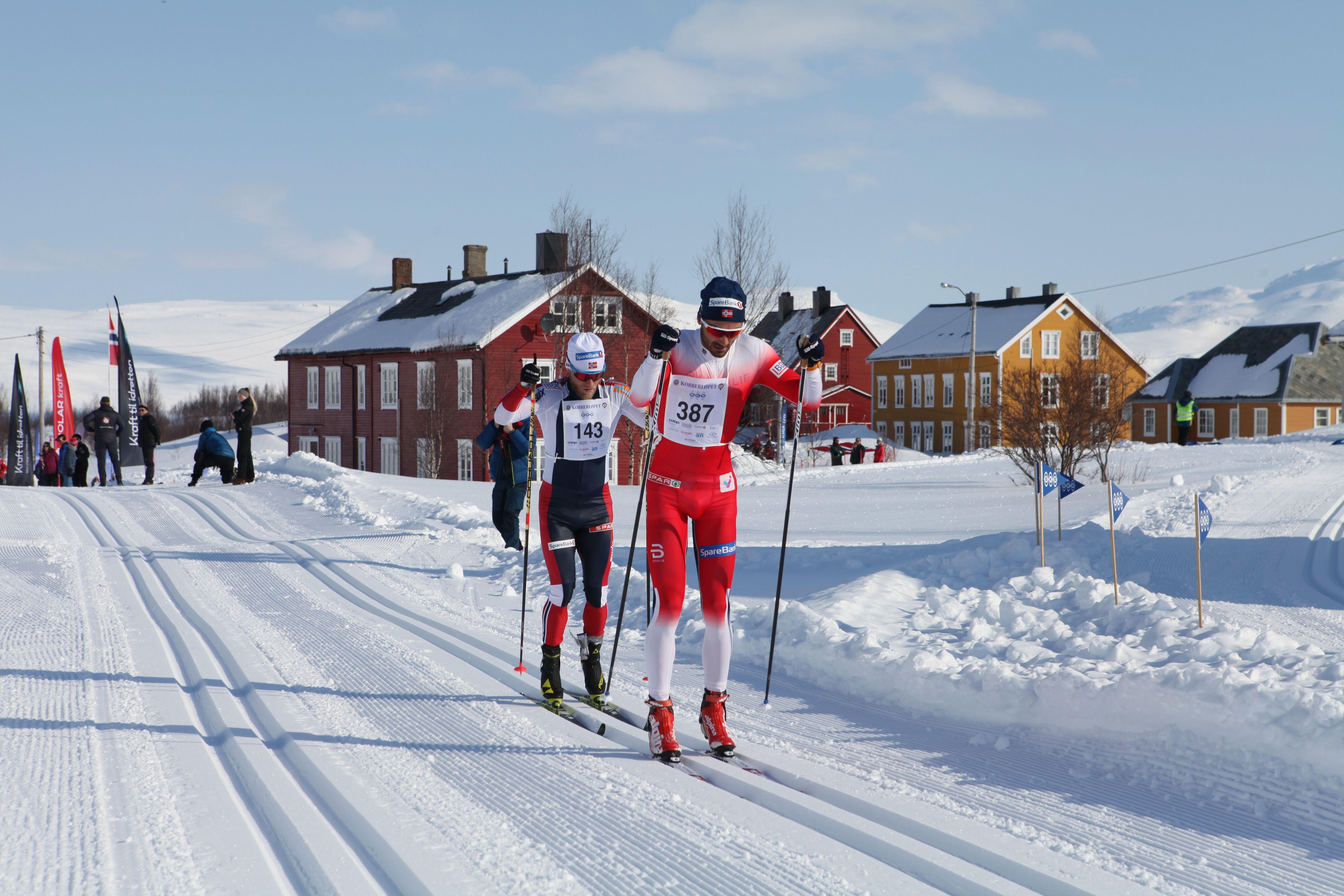 Foto: Svein Spjelkavik